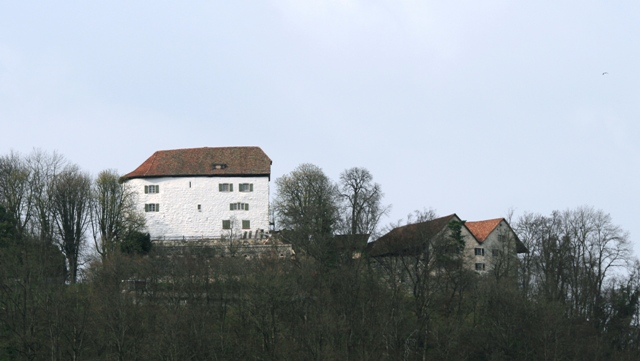 Schloss Brunegg, Aargau, Schweiz